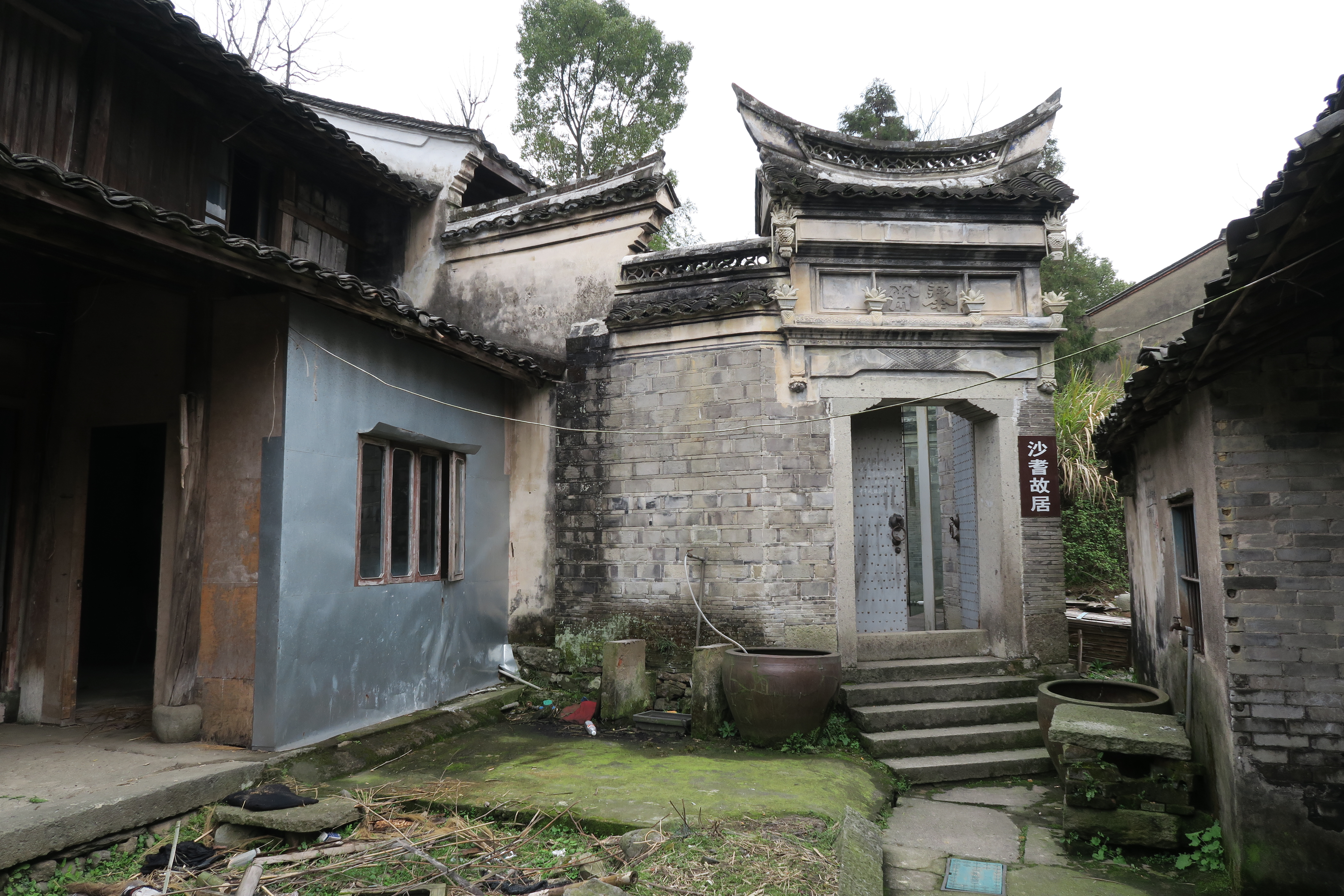 塘溪沙耆故居